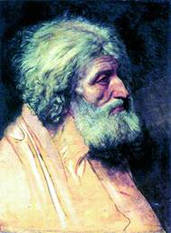 Голова старика